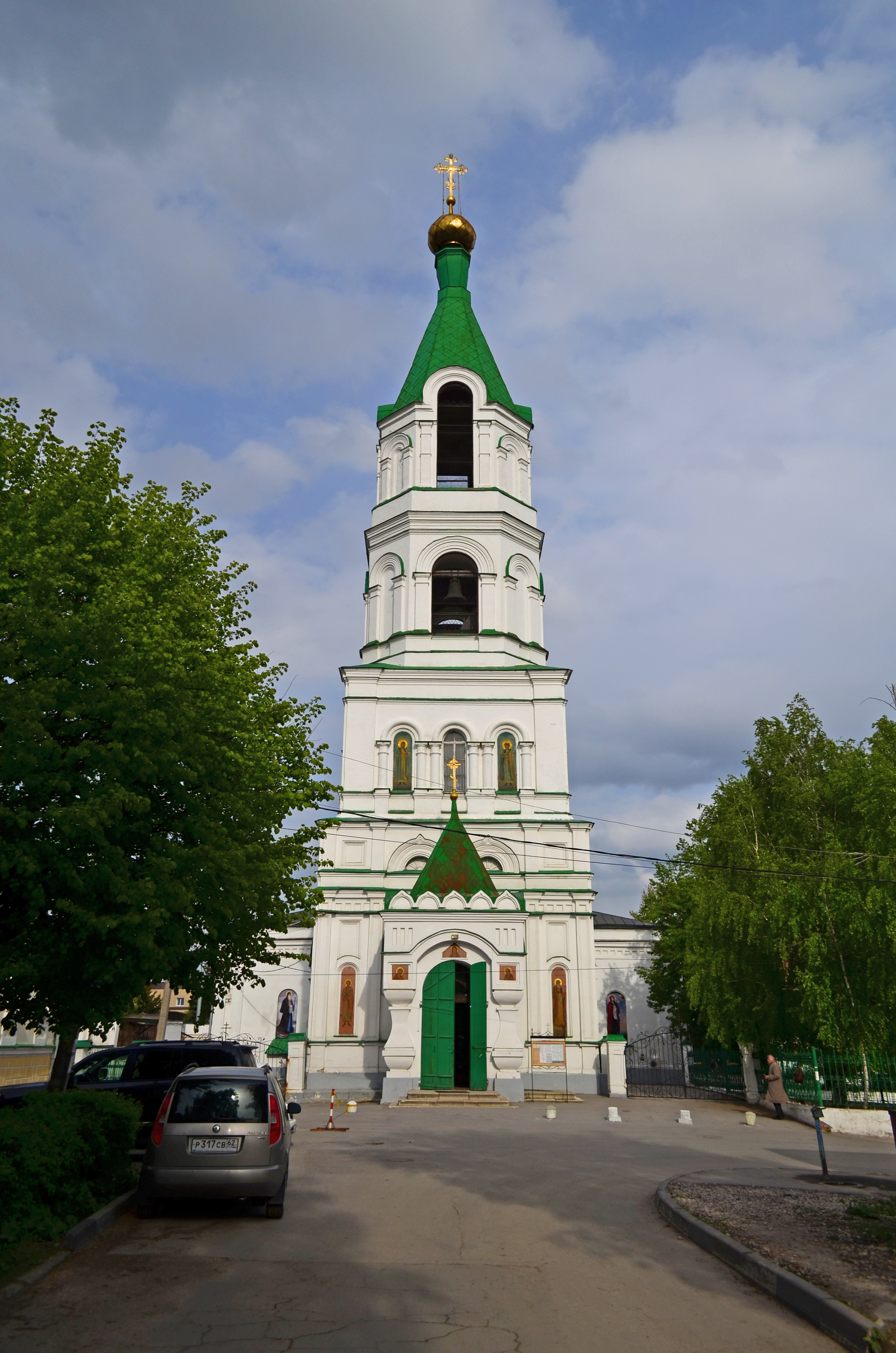 Рязань.Борисо-Глебский кафедральный собор.